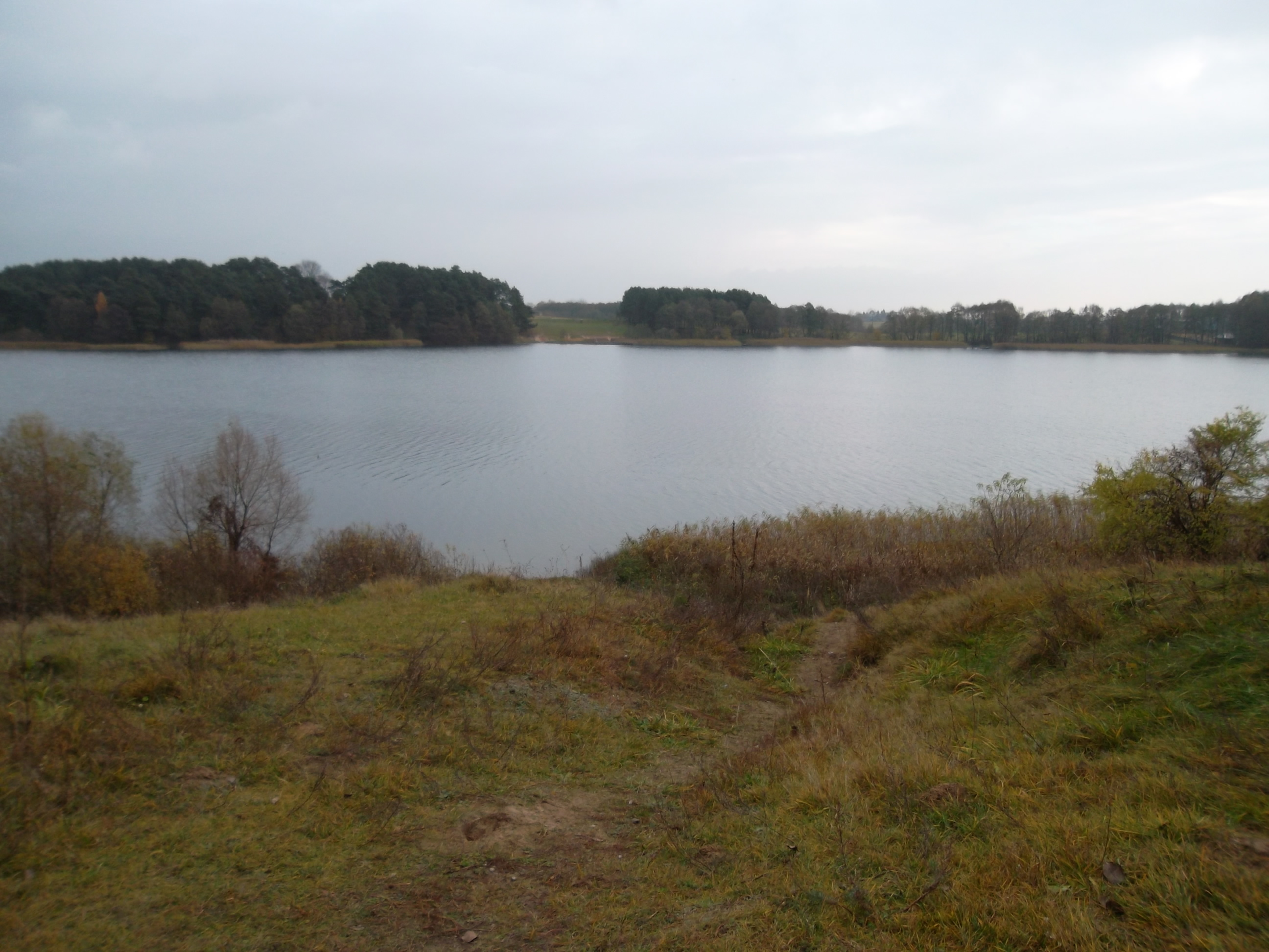 Ežeras Orija, Kalvarijos sav.